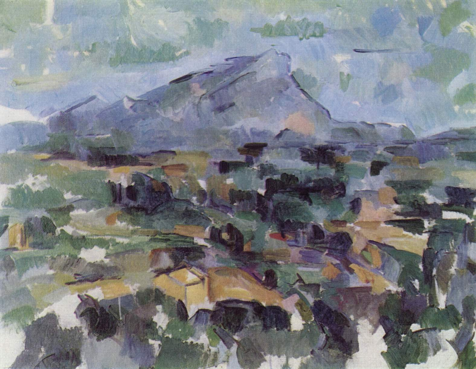 Der Maler baut die Landschaft vor seinem immer wieder gewähltem Motiv, dem Hl. Siegesberg, aus lauter würfelig gehaltene Farbflecken auf und reduziert sie so auf deren grobe geometrische Grundform. Einzelne Umrisse verstärken den Bildgegenstand. Das Kolorit ausgewogen und nach Vorgabe aus der Natur übernommen. So gewinnt das Auge in dessen Addition dennoch einen natürlichen Eindruck - eine Impression.